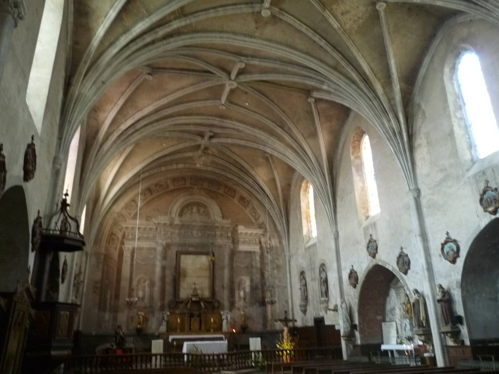 église fortifiée de Labastide-d'Armagnac, Landes, France